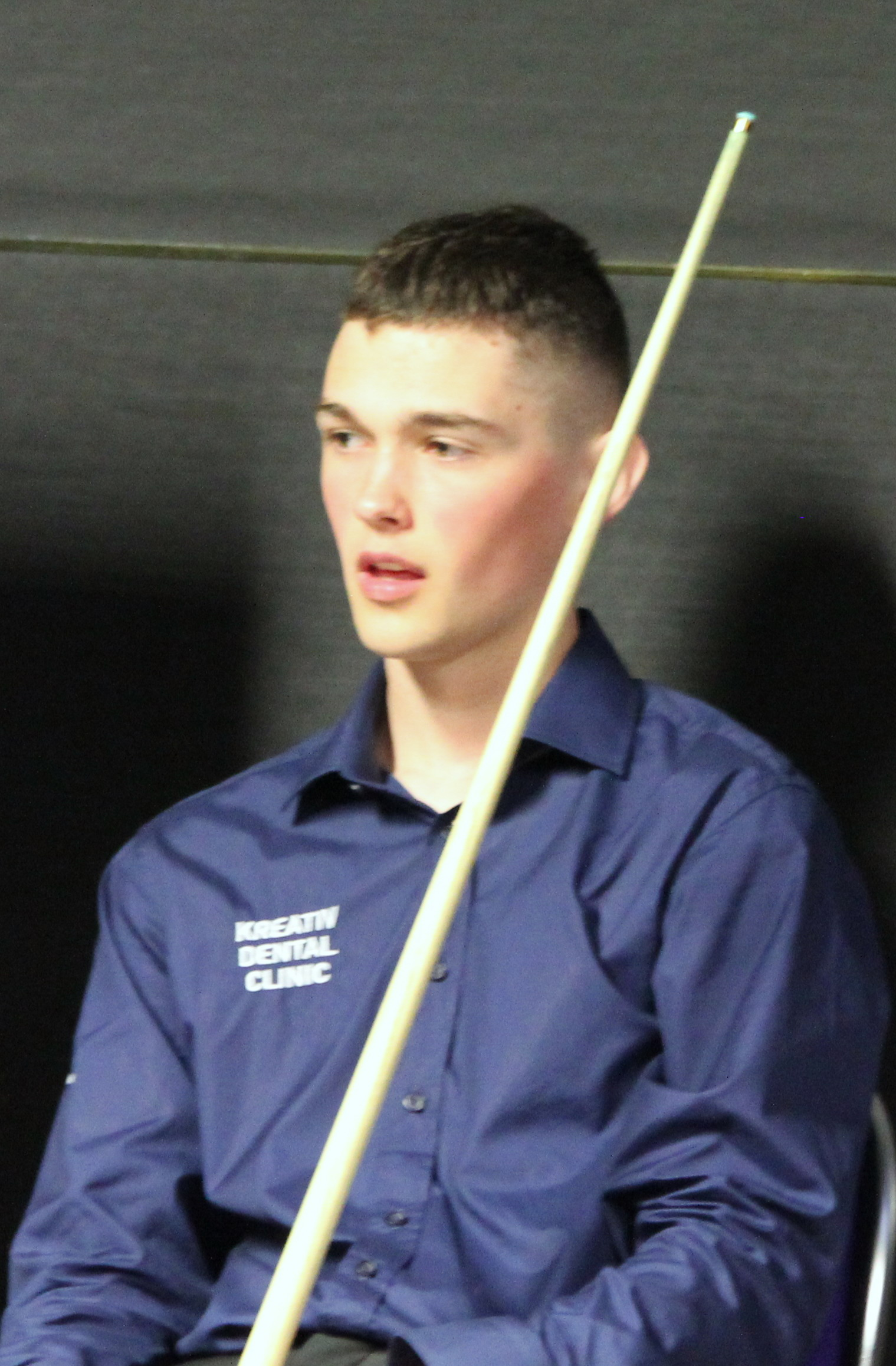 Rhys Clark beim Paul Hunter Classic 2015